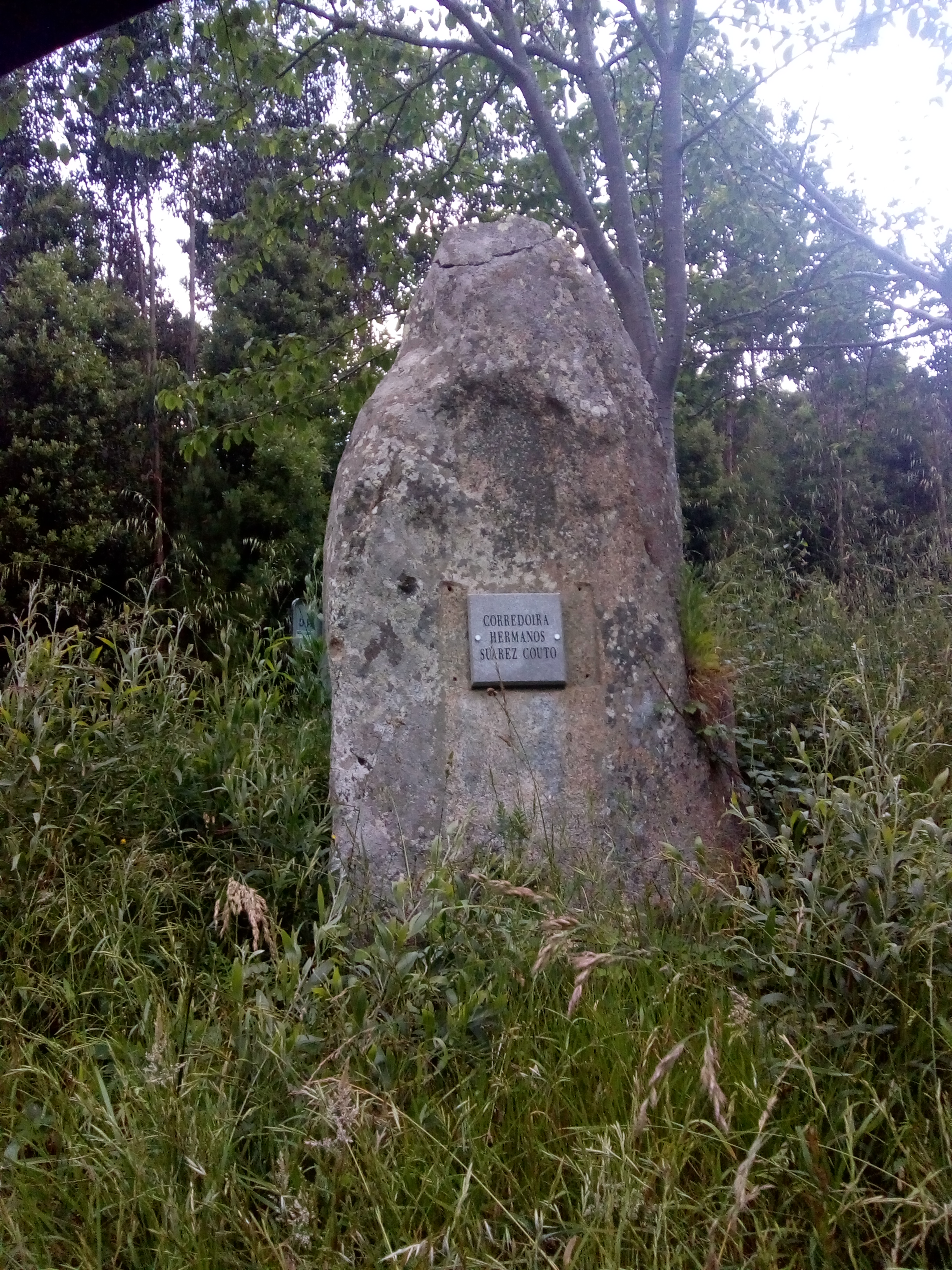 Monolito Corredoira irmáns Suárez Couto no monte de Santa Cruz, Ribadeo